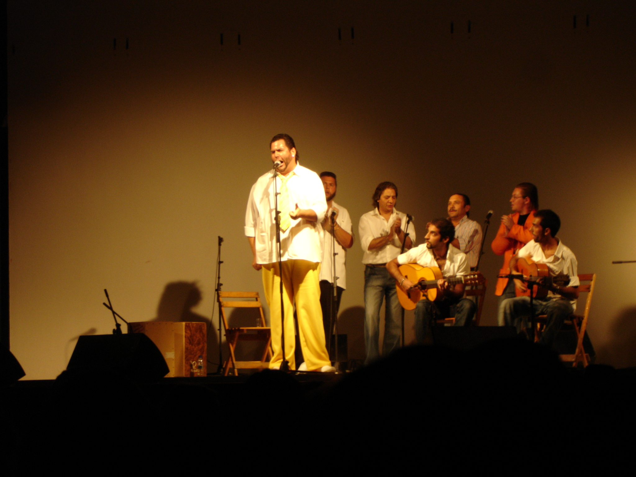 Juanillorro.Flamenco show in Jerez de la Frontera, Andalusia (Spain)